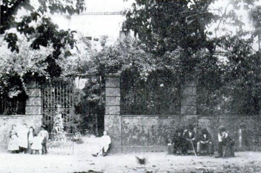 Entrada á quinta de San Vitorio, nas mariñas betanceiras, onde o escritor Xohán Vicente Viqueira residíu os derradeiros anos da sua vida